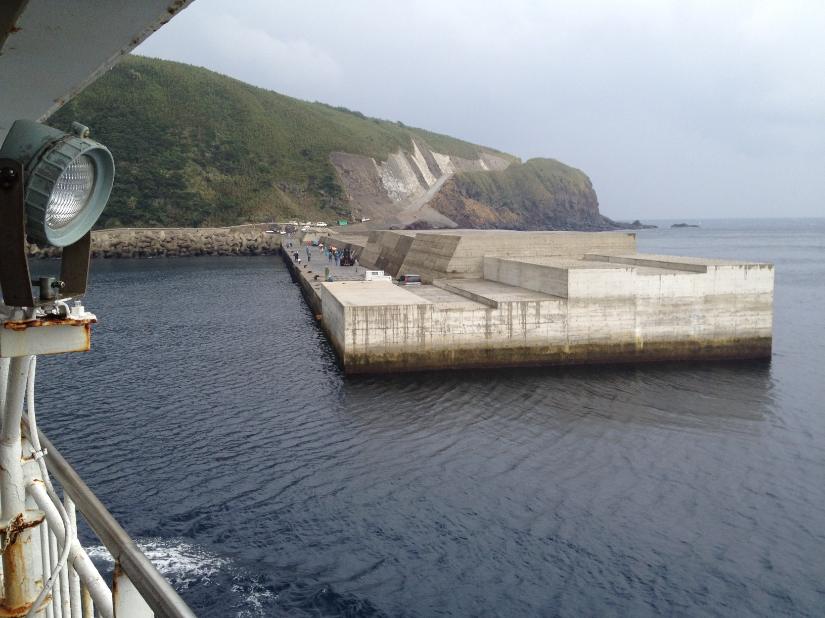 諏訪之瀬島、元浦港。 メインの切石港が台風で土砂が堆積してしまったため、サブ港の元浦港に。サブ港を使っているせいで、代船のみしまが十島航路に就くことができず、ドック入りが延期に。